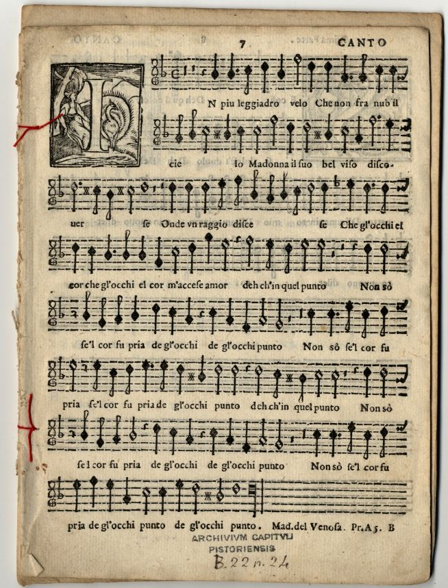 Musica a stampa conservata nella Bibliotheca Musicalis di Pistoia